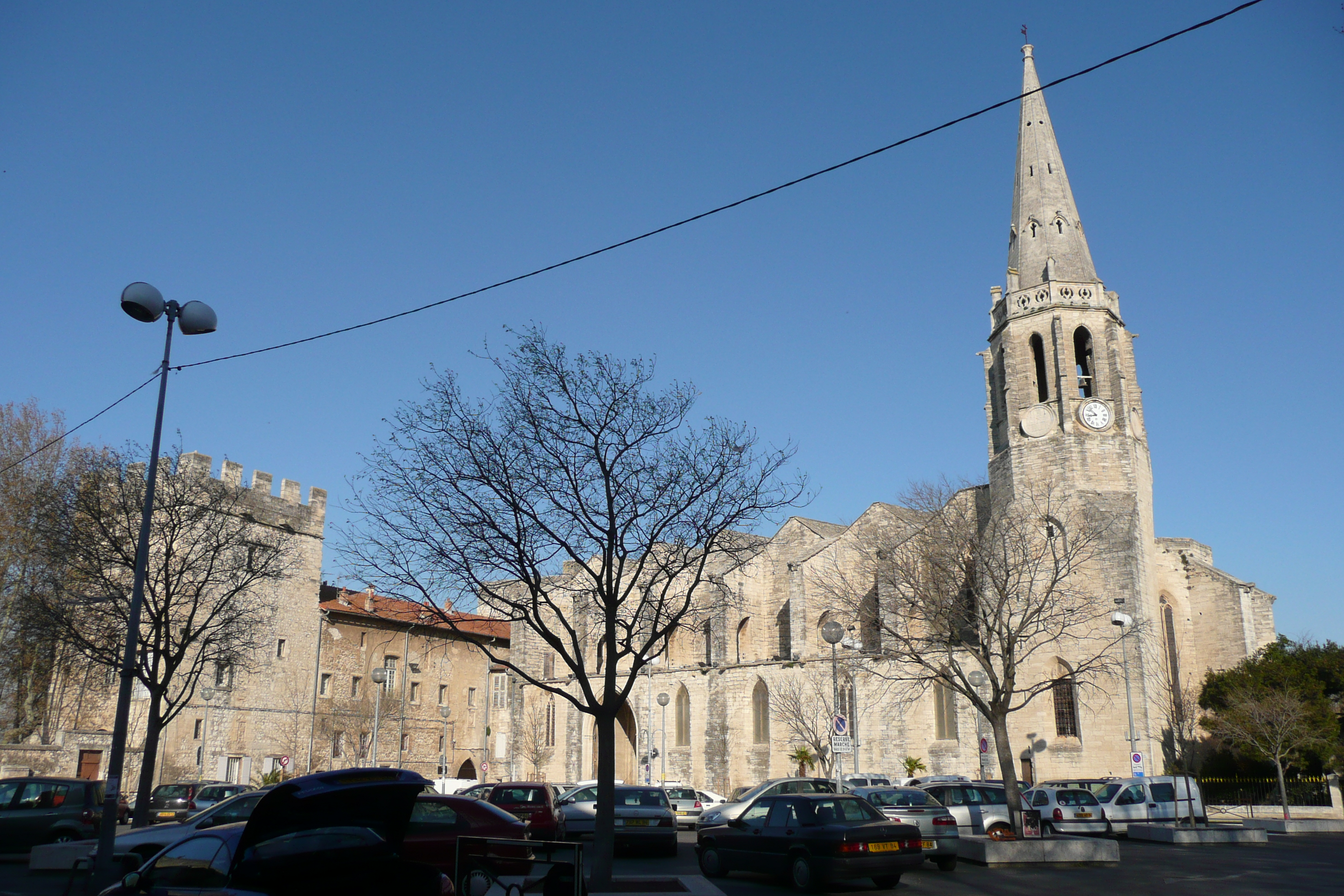 Eglise 14 èmes siècles à Montfavet.